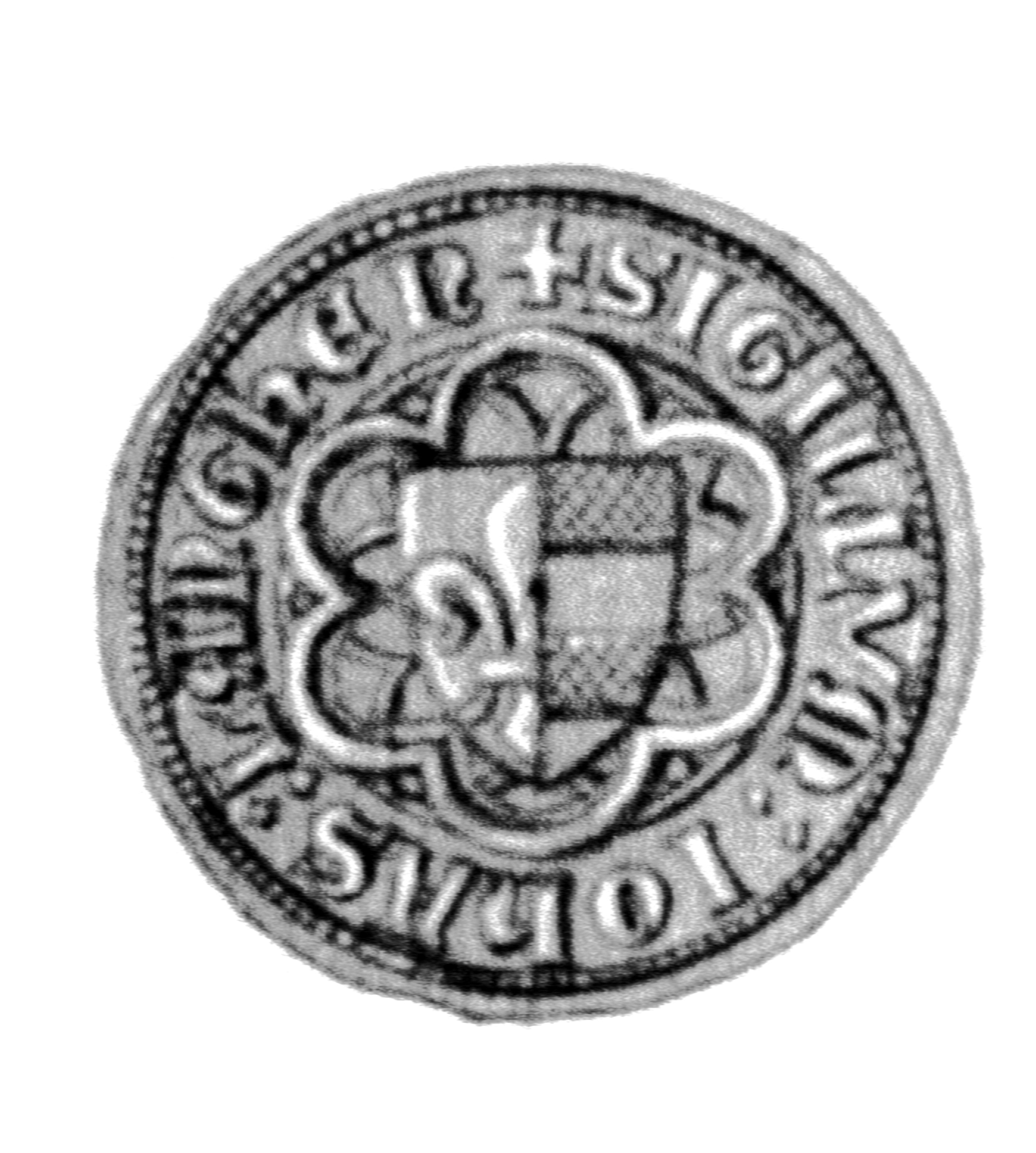 Siegel des Ratsmannes Johann Langhe. Das Siegel stammt aus der Zeit um 1370. Siehe Emil Ferdinand Fehling: Lübeckische Ratslinie, Nr. 401 (Johann Lange).